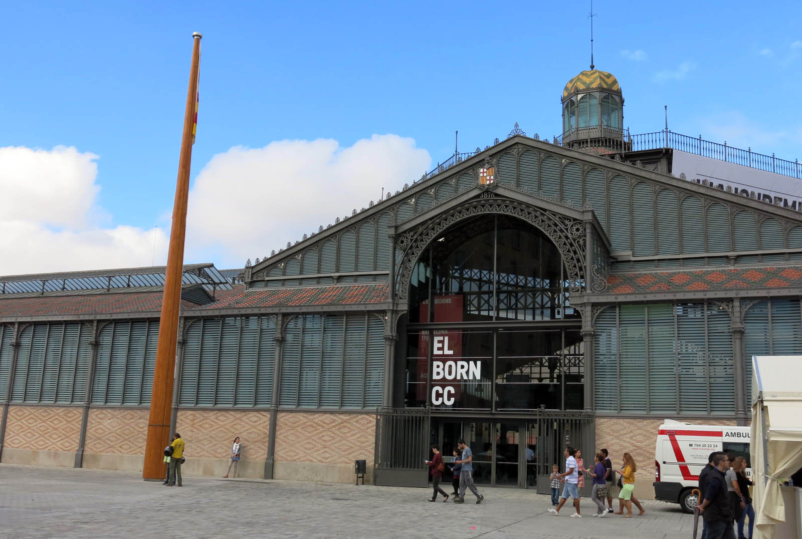 Mercat del Born (Barcelona) Object location41° 23′ 08.76″ N, 2° 11′ 01.54″ E